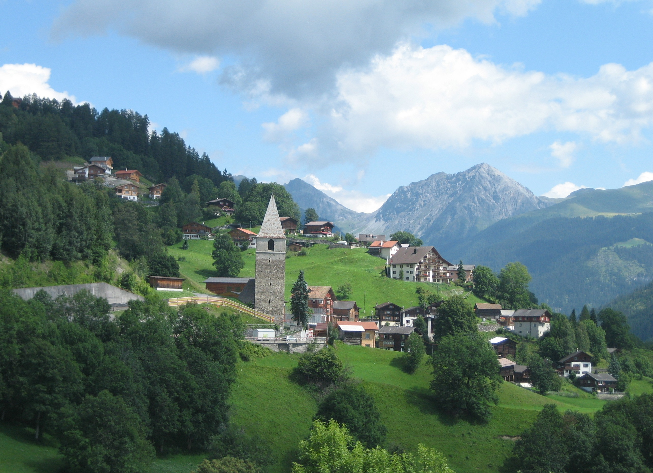 Schanfigg bei Langwies nach Osten